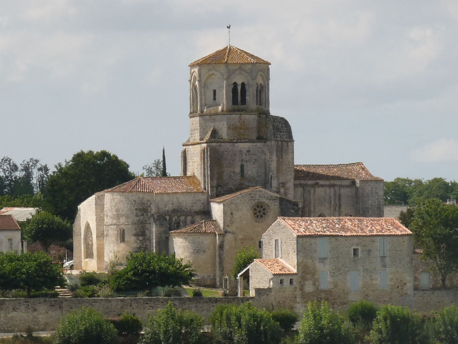 l'église de St-Sulpice-d'Arnoult, Charente-Maritime, France